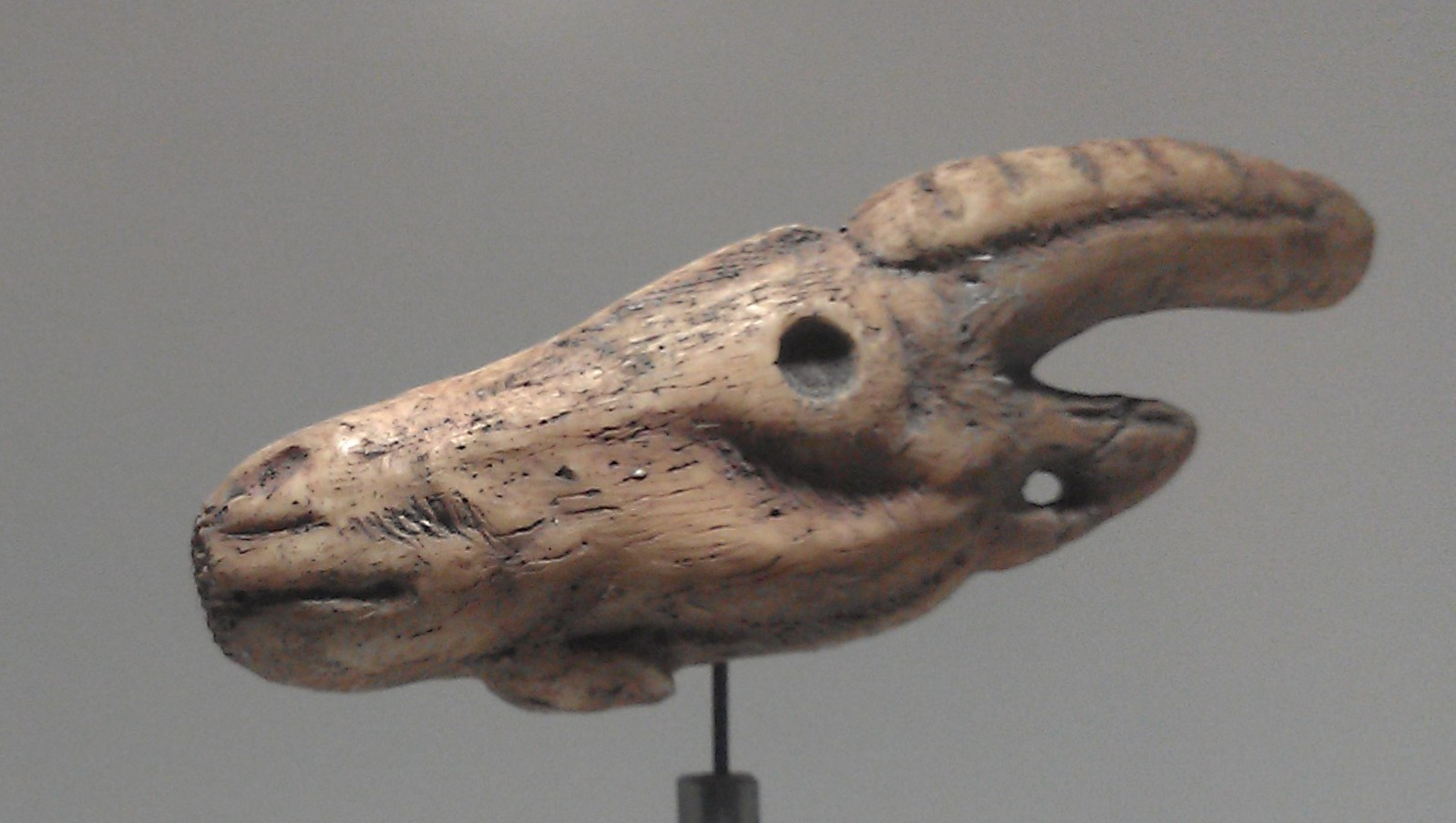 Parque de la Prehistoria de Teverga, Asturias (España) Cabeza de cabra. Cueva de Tito Bustillo (Asturias. España) Escultura en asta de ciervo. Réplica del original del Museo Arqueológico de Asturias, Oviedo.